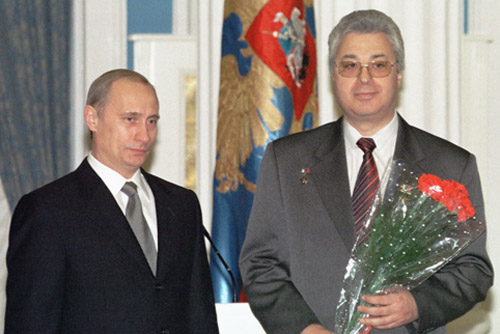 МОСКВА, КРЕМЛЬ. Церемония вручения государственных наград. Звание Героя Российской Федерации присвоено космонавту Юрию Батурину.